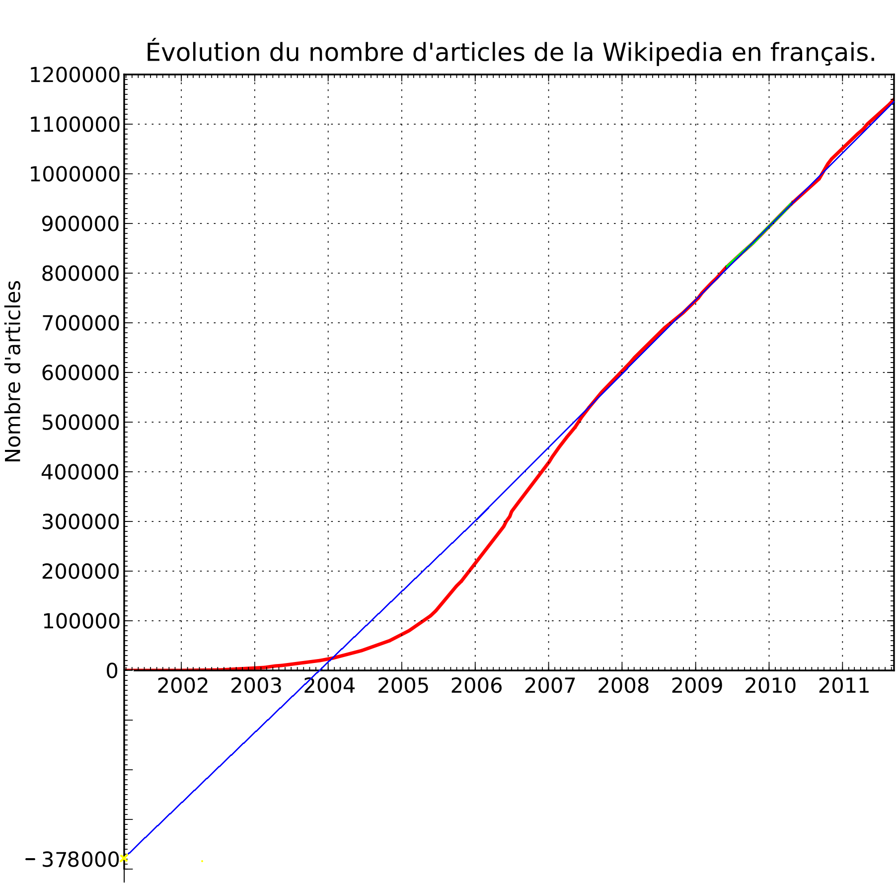 Graphique présentant l'évolution du nombre d'articles sur la Wikipédia en français avec ajout de la représentation graphique d'une fonction affine avec son ordonnée à l'origine.